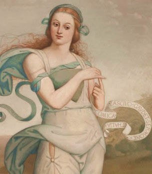 218.4 × 114.3 cm